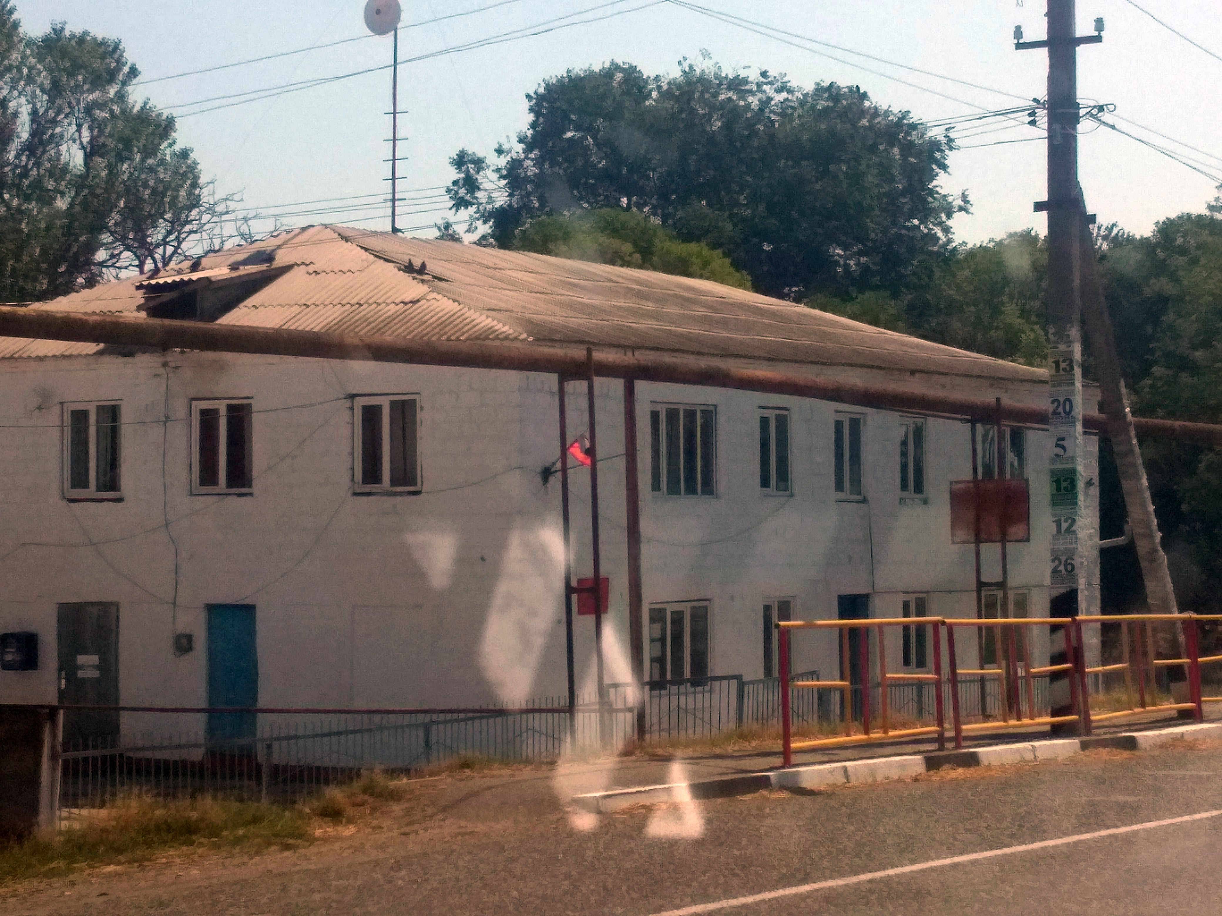 Нохчийн: Геметюбера т1ек1ел дина ц1а